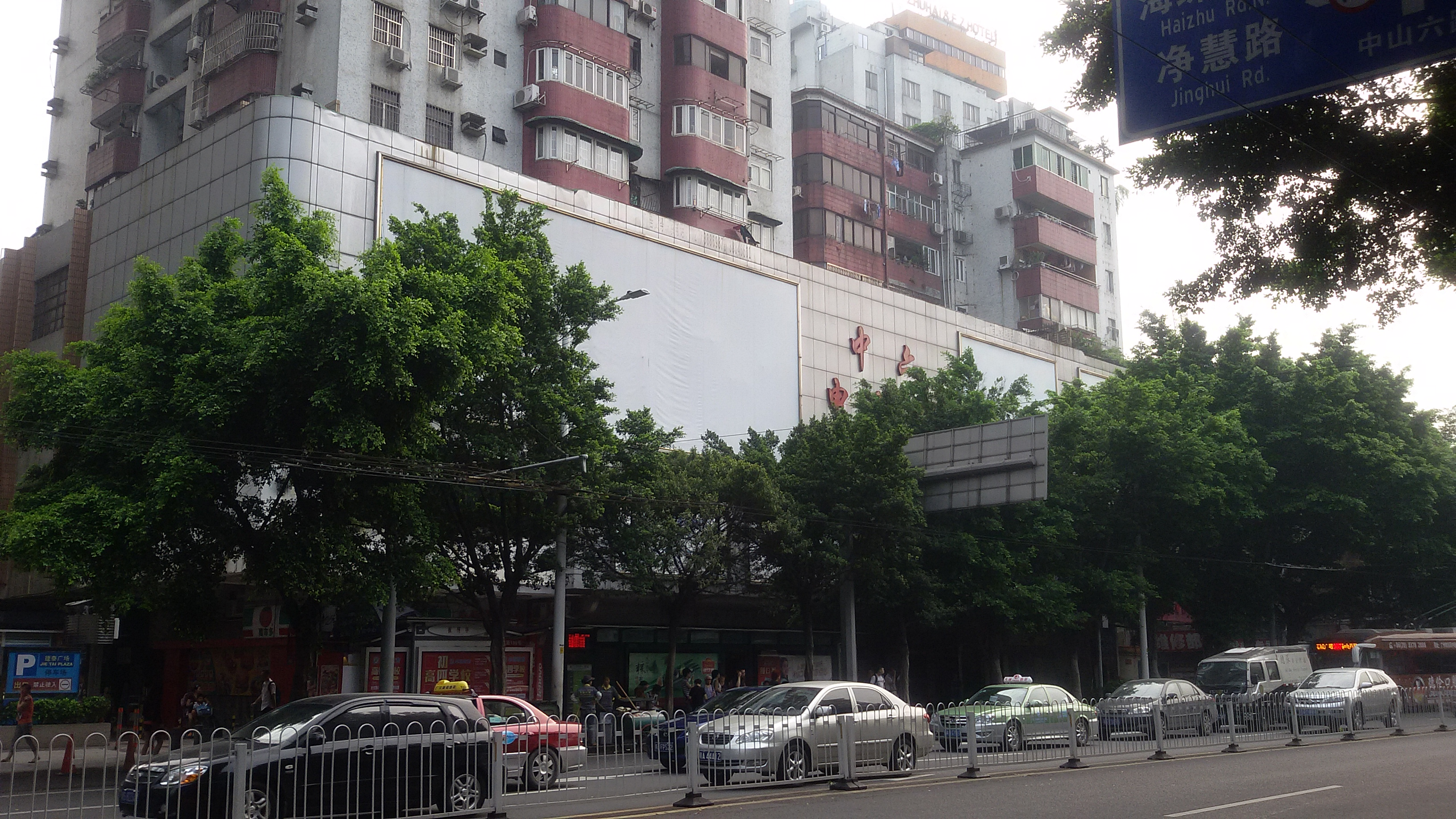 粵語: 中六电脑城（喺馬路對面望過嚟）